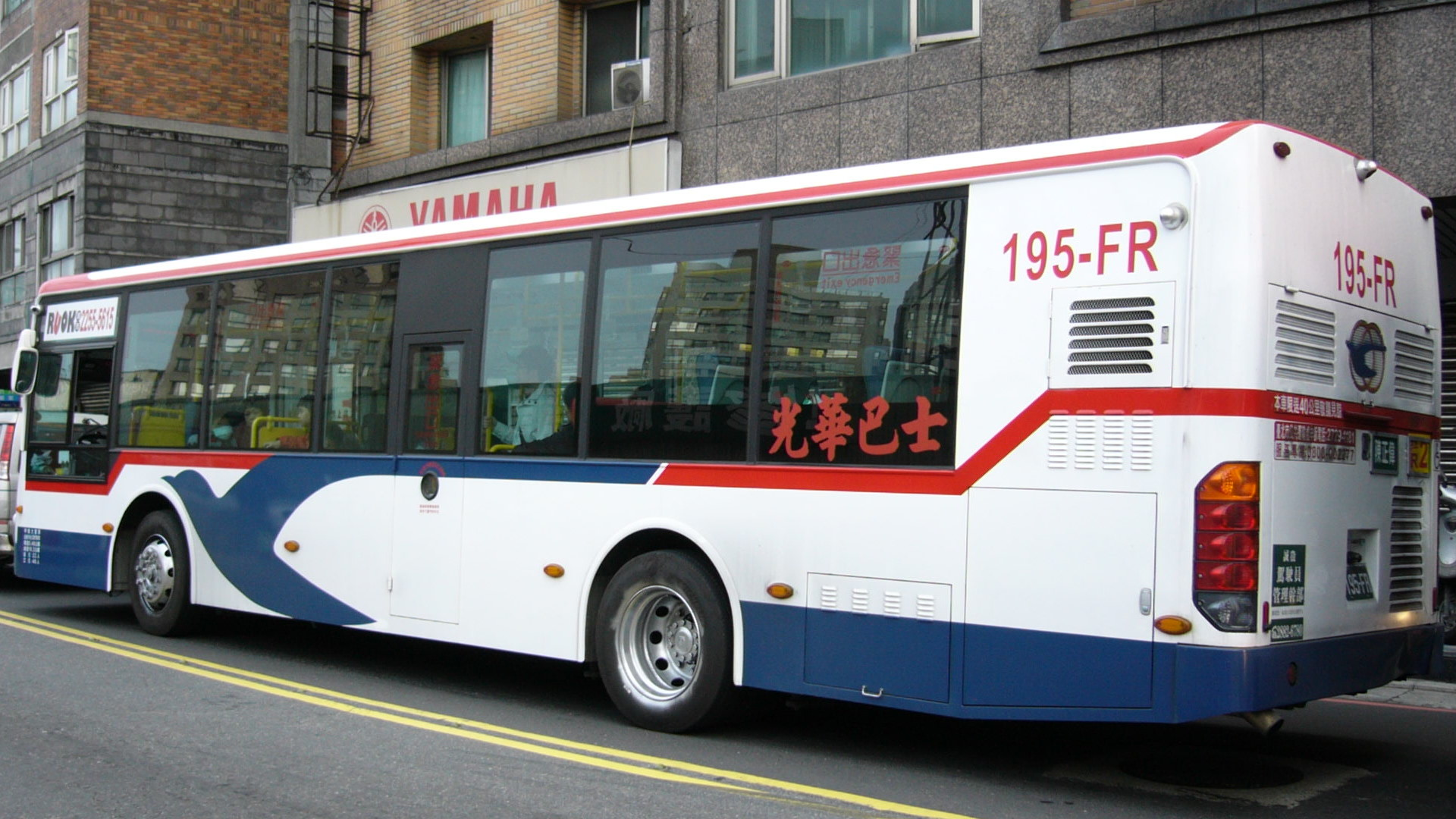 光華巴士的KINGLONG KL6112U1大客車195-FR左方外觀